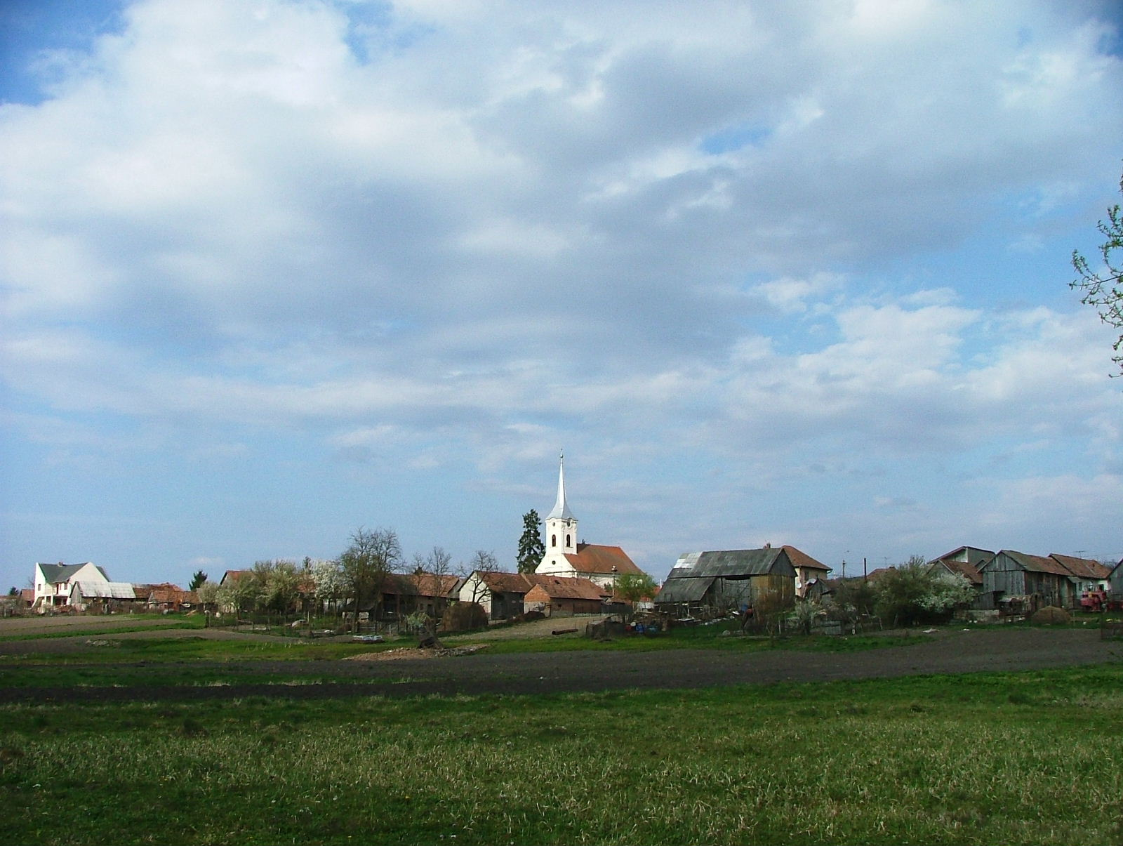 Biserica reformată